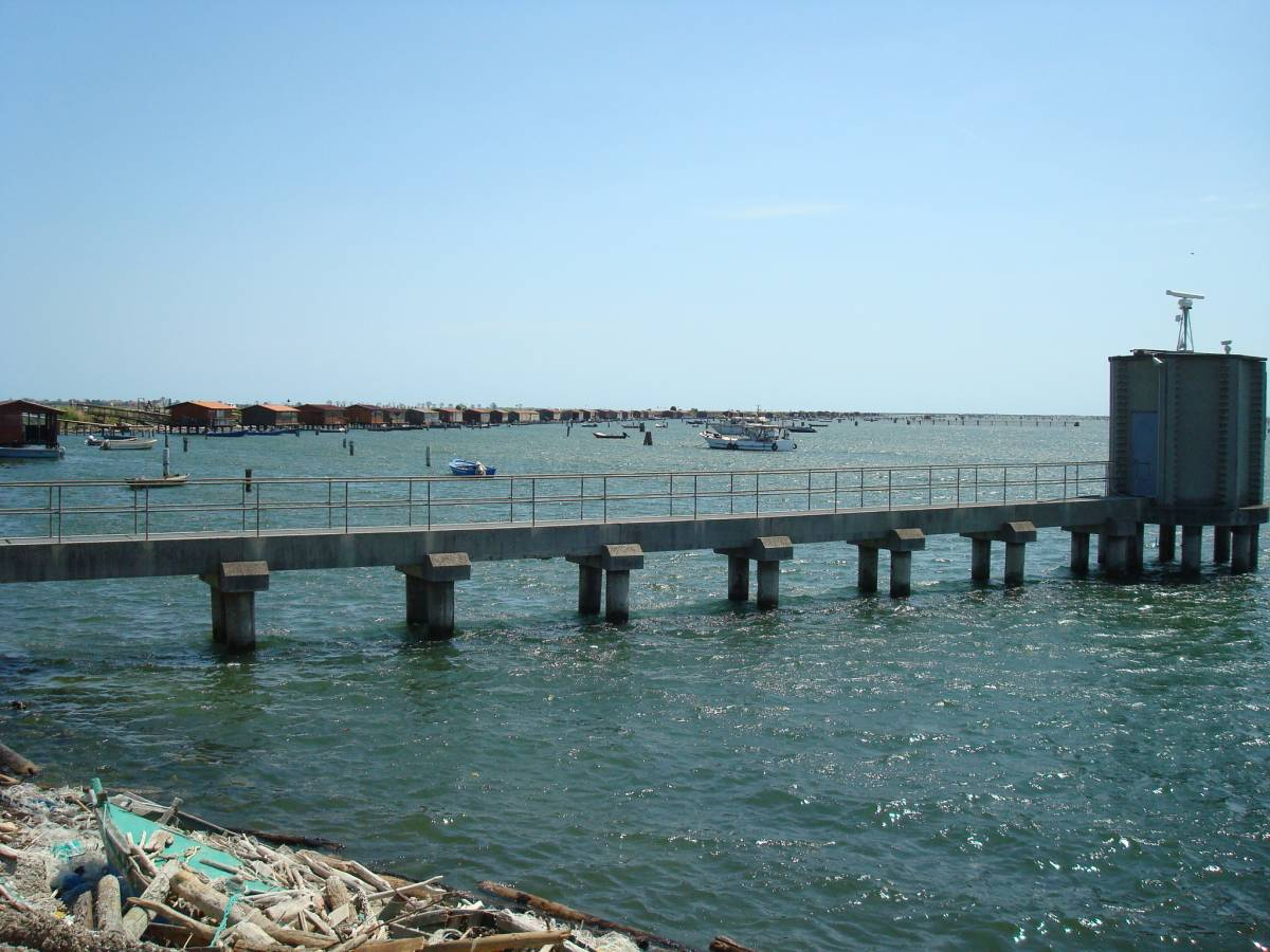 Cabanes de pèche de l'anse se Scardovari, commune de Porto-Tolle, prov. de Rovigo, Italie